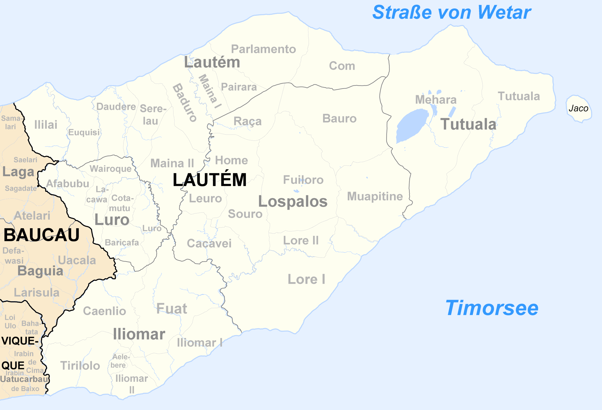 Sucos des Distrikts Lautém/Osttimor nach der Neustrukturierung 2003